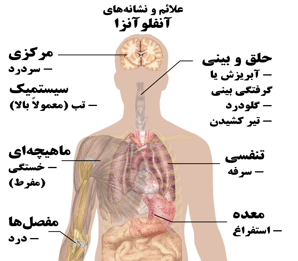 علائم و نشانه‌های اصلی بیماری آنفلوآنزا (آنفلوانزا#علائم بیماری را ببینید)